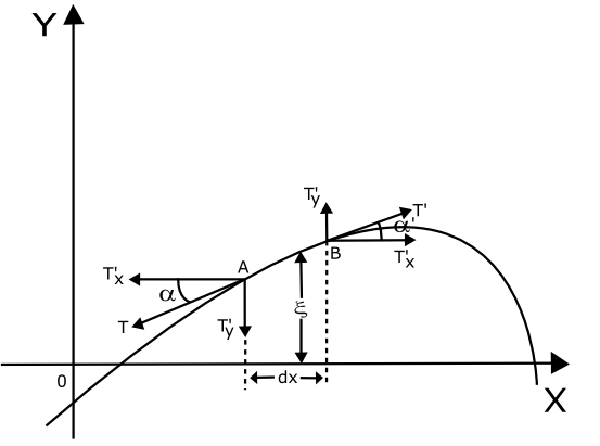 Melde's experiment graph